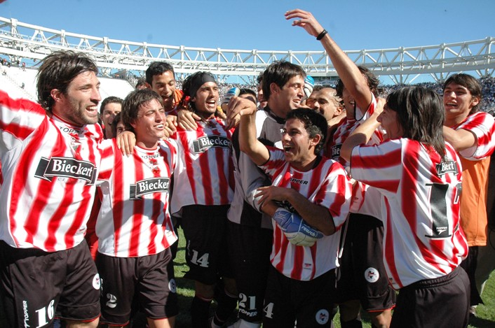 Los jugadores de Estudiantes de La Plata celebrando, al final del partido, la victoria en el clásico platense por 7-0, el 15 de octubre de 2006.